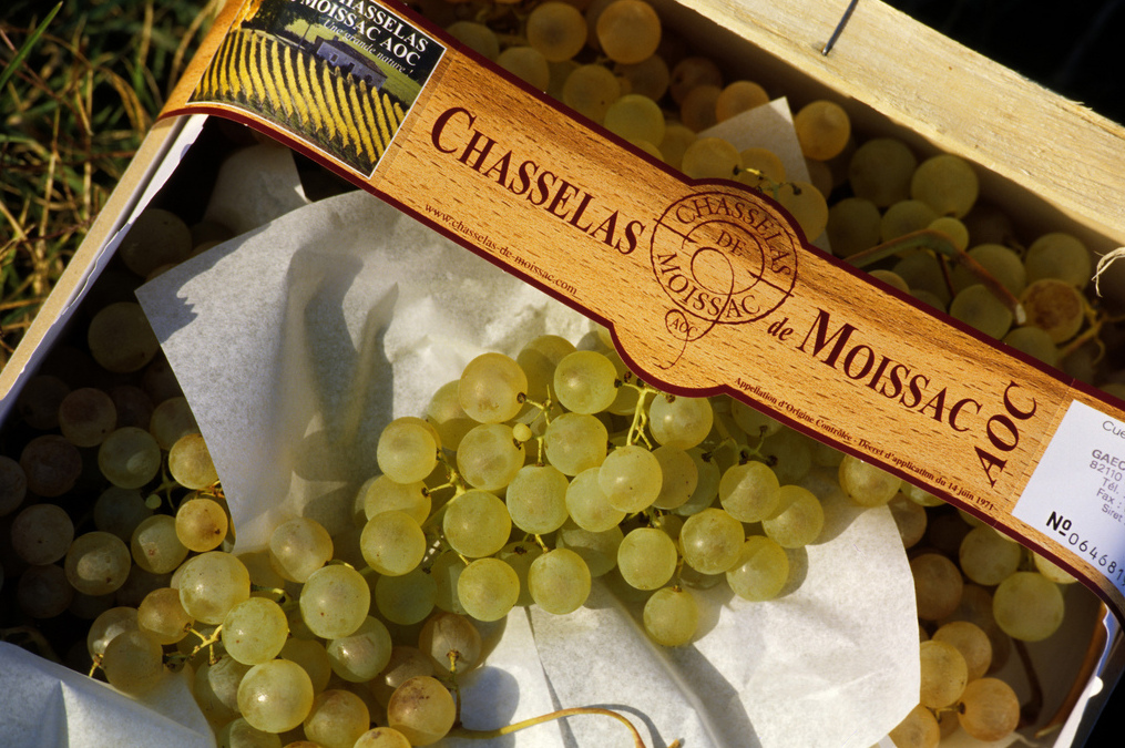 Cela est du chasselas présenér dans un plateau et identifié avec une bande qu'il appartient à la region de Moissac et qu'il est qualifié AOC